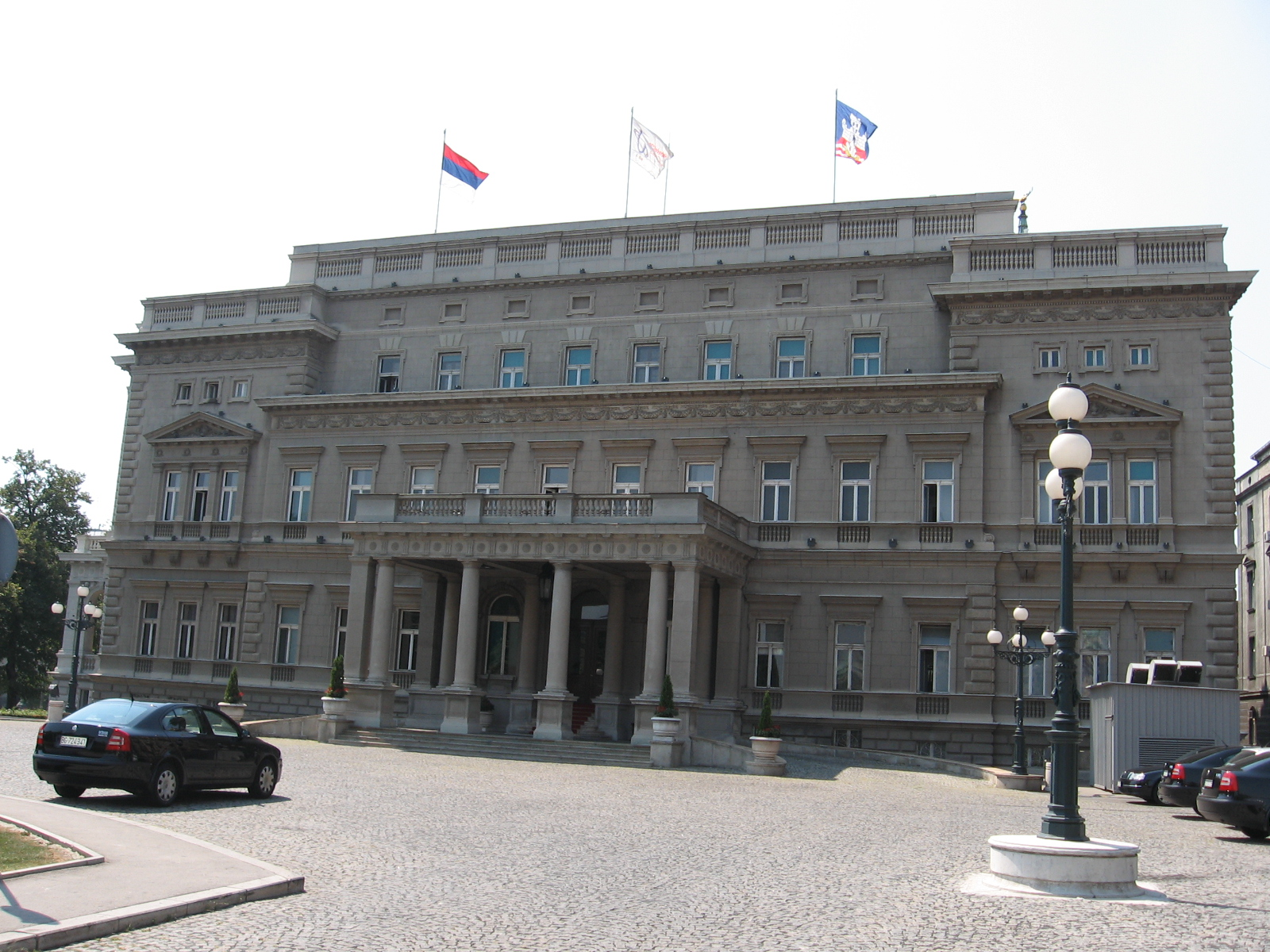 Stari Dvor (Old Palace), Belgrade